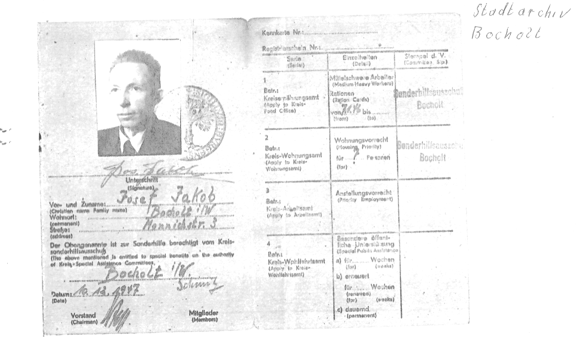 Familienarchiv Wilhelm Jakob, Sohn von Josef Jakob